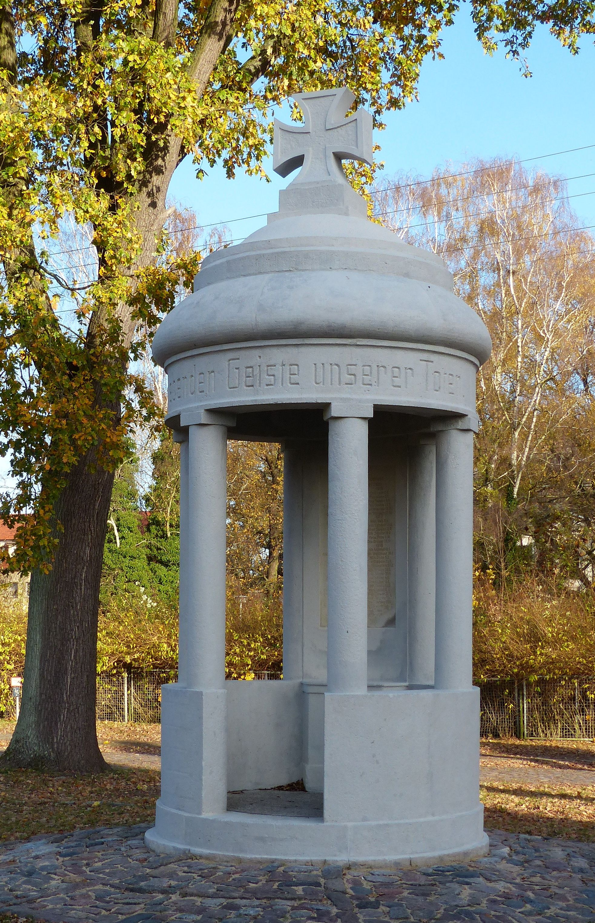 Nach gerade abgeschlossener Renovierung dürfte sich das Denkmal für die im 1. Weltkrieg Gefallenen (Tafel mit allen Namen im Innern des Rondells) so wie nach seiner Errichtung präsentieren.